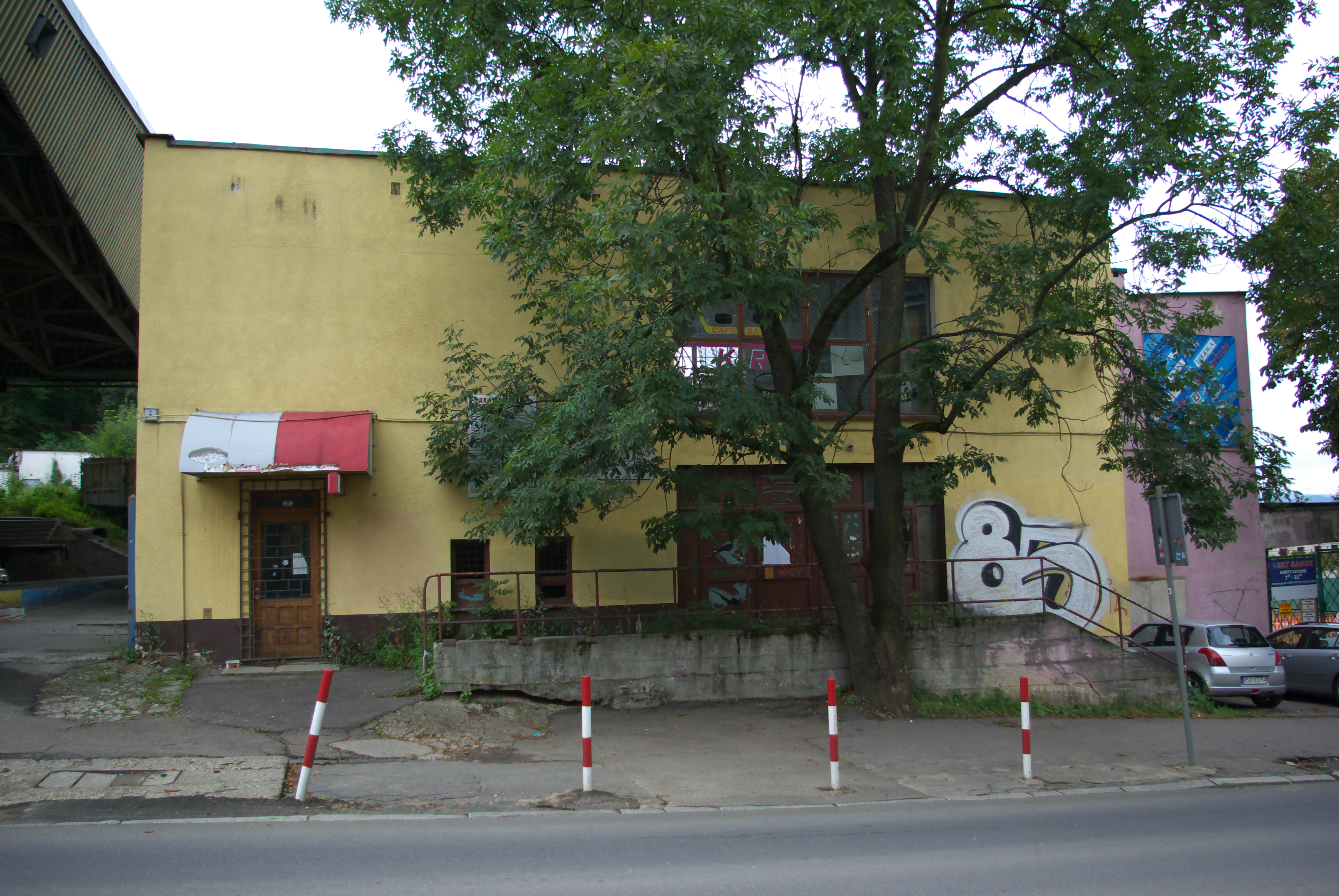 Budynek przy Mickiewicza 12 w Sanoku